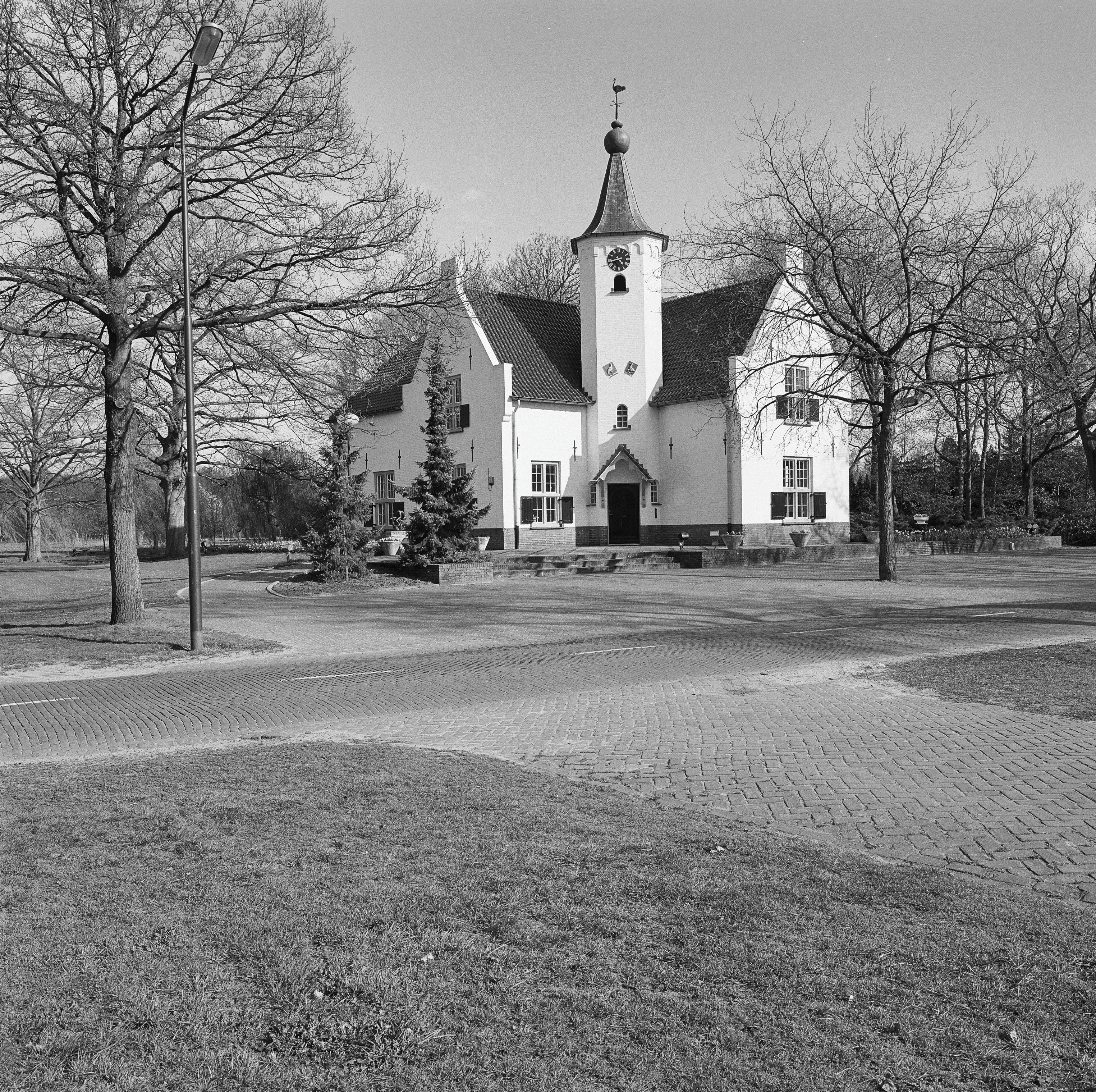 Cranendonck: Overzicht voorgevel en linker zijgevel met toren, landhuis, voormalig raadhuis (opmerking: Gefotografeerd voor Monumenten In Nederland Noord-Brabant, bladzijde 297)